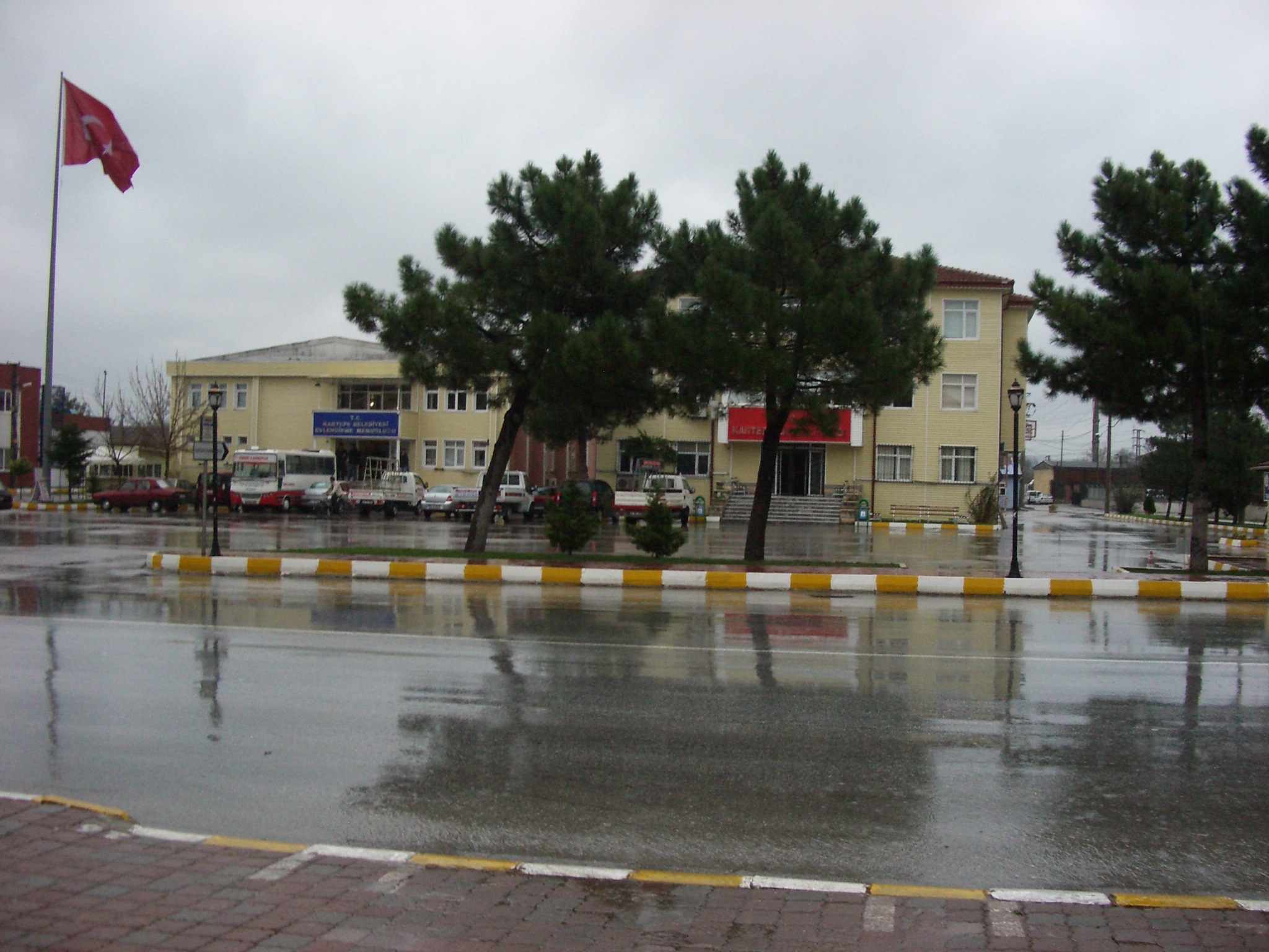 Kartepe Valisi / Belediye